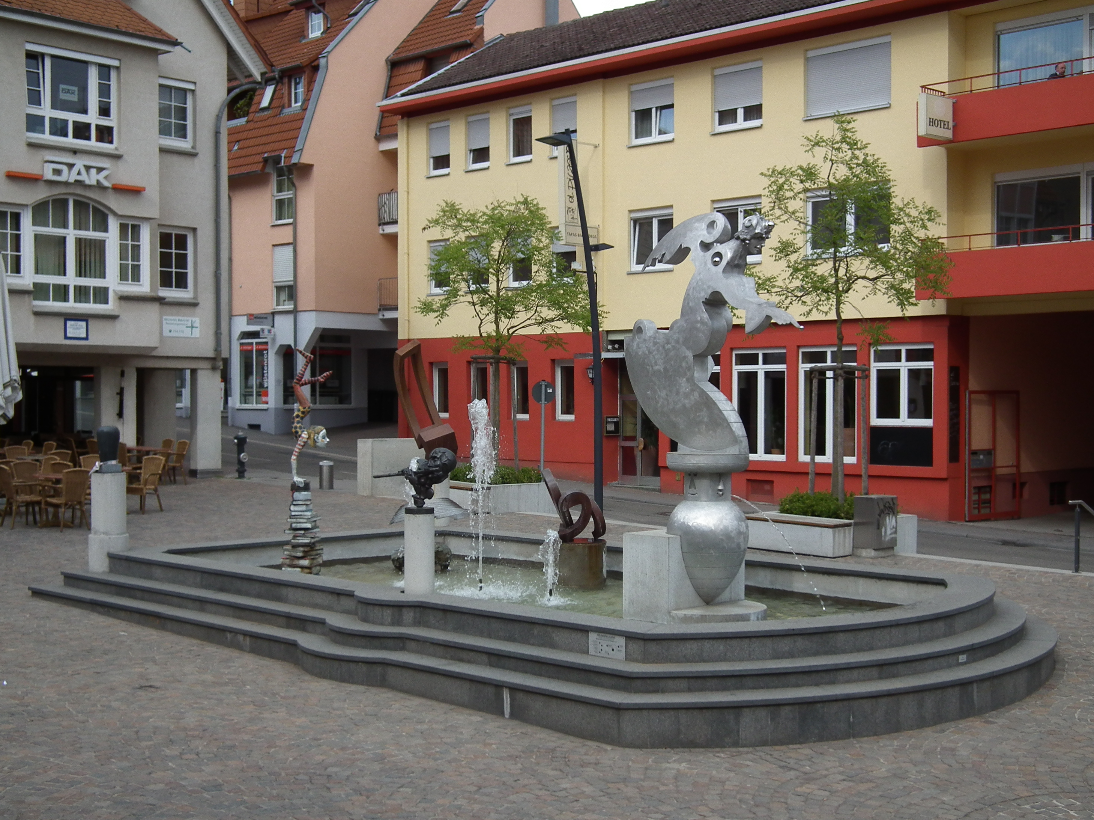 Brunnengalerie in Wiesloch (Baden-Württemberg, Deutschland)